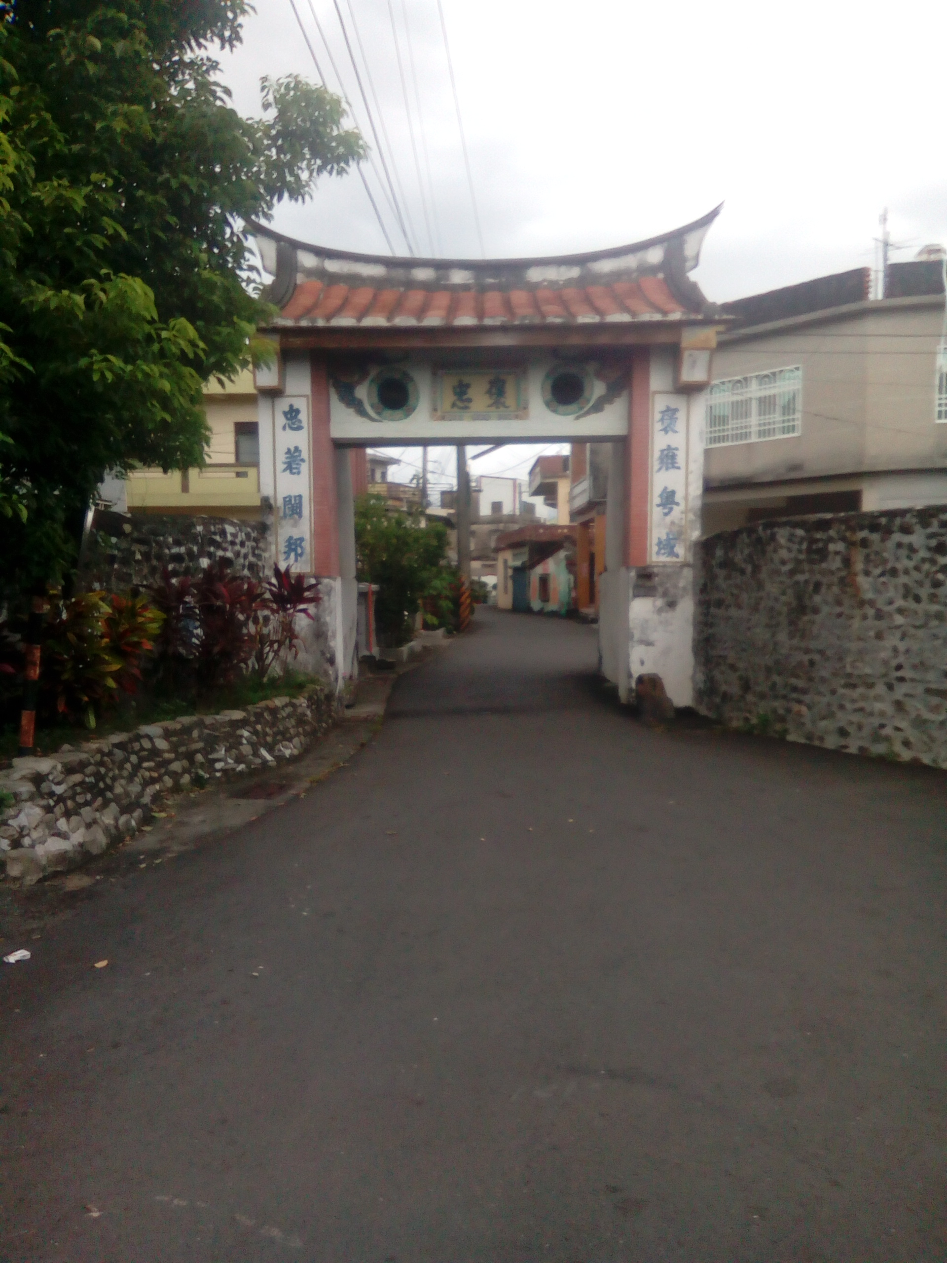 位於蕭宅及楊氏宗祠的小徑上